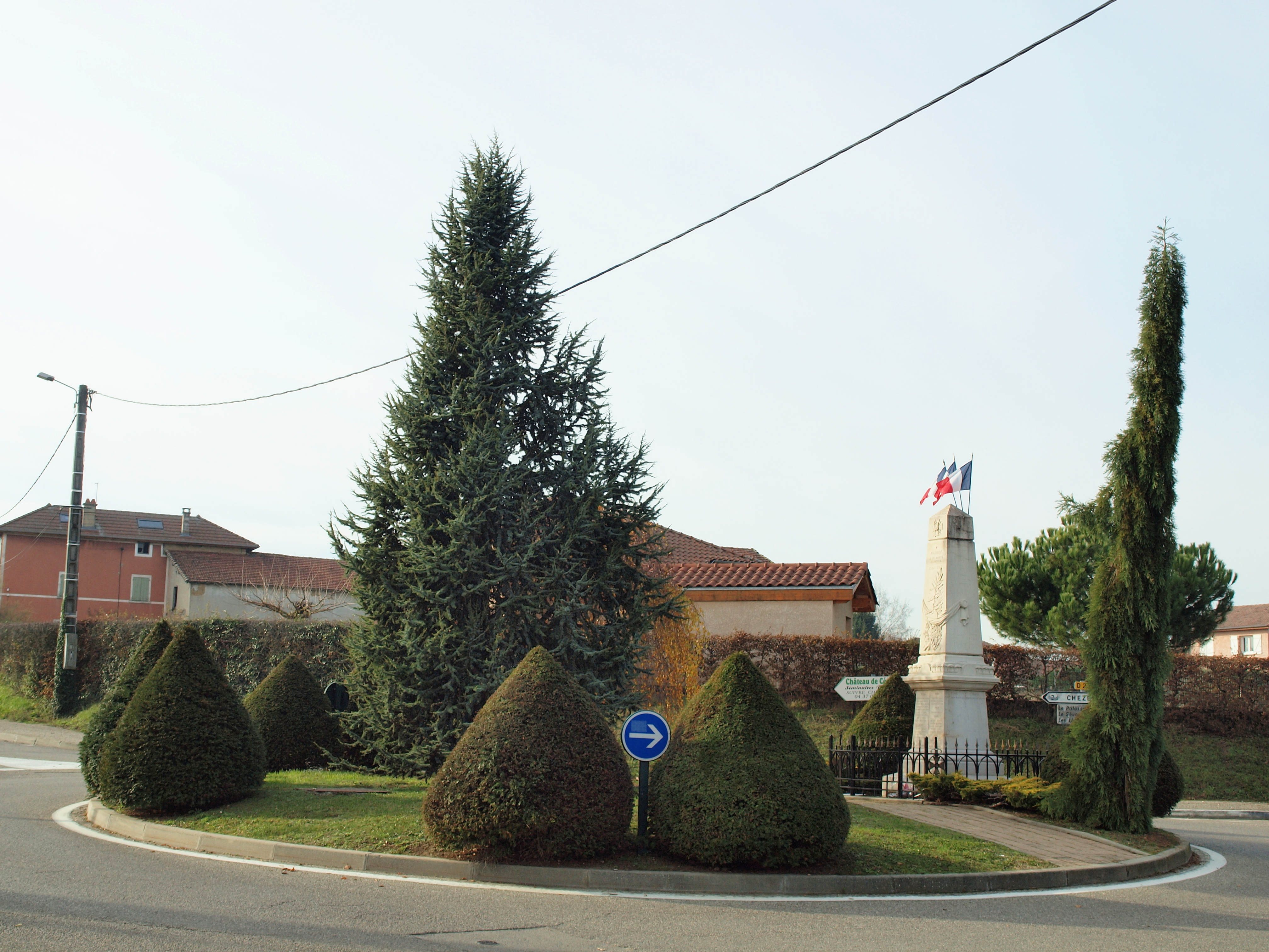 Maubec (Isère, France)